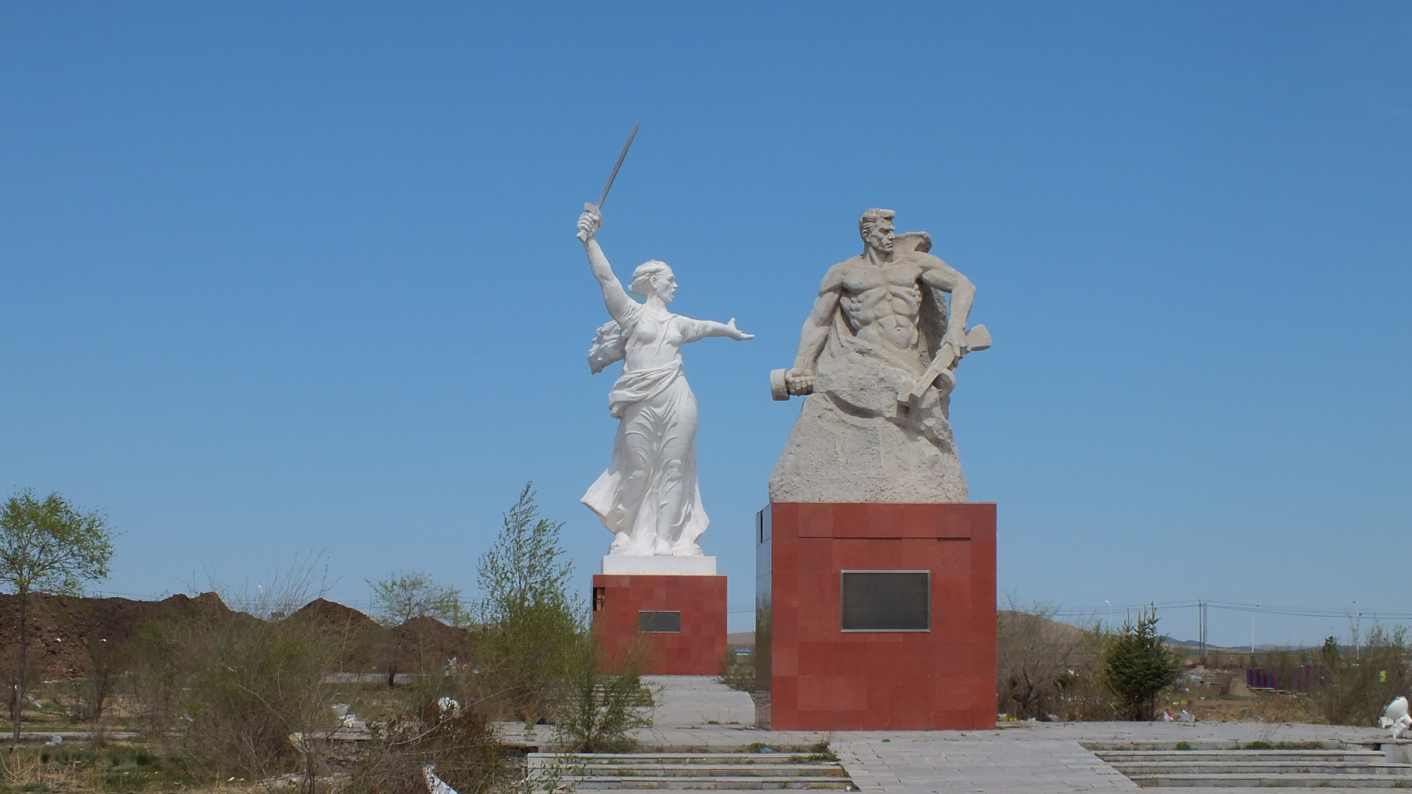 Копия скульптуры "Родина Мать зовет" установленная в городе Маньчжурия